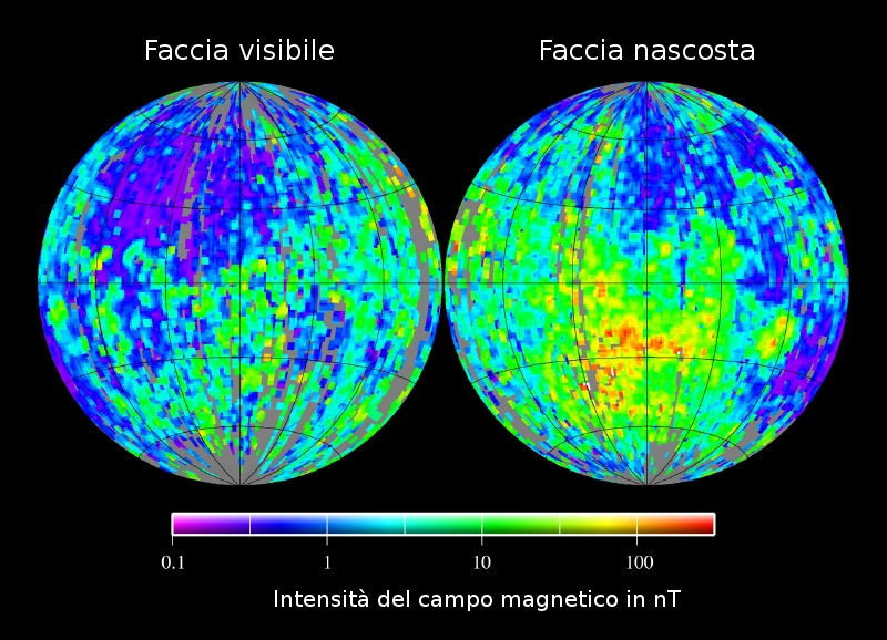 Mappa dell'intensità del campo magnetico della Luna